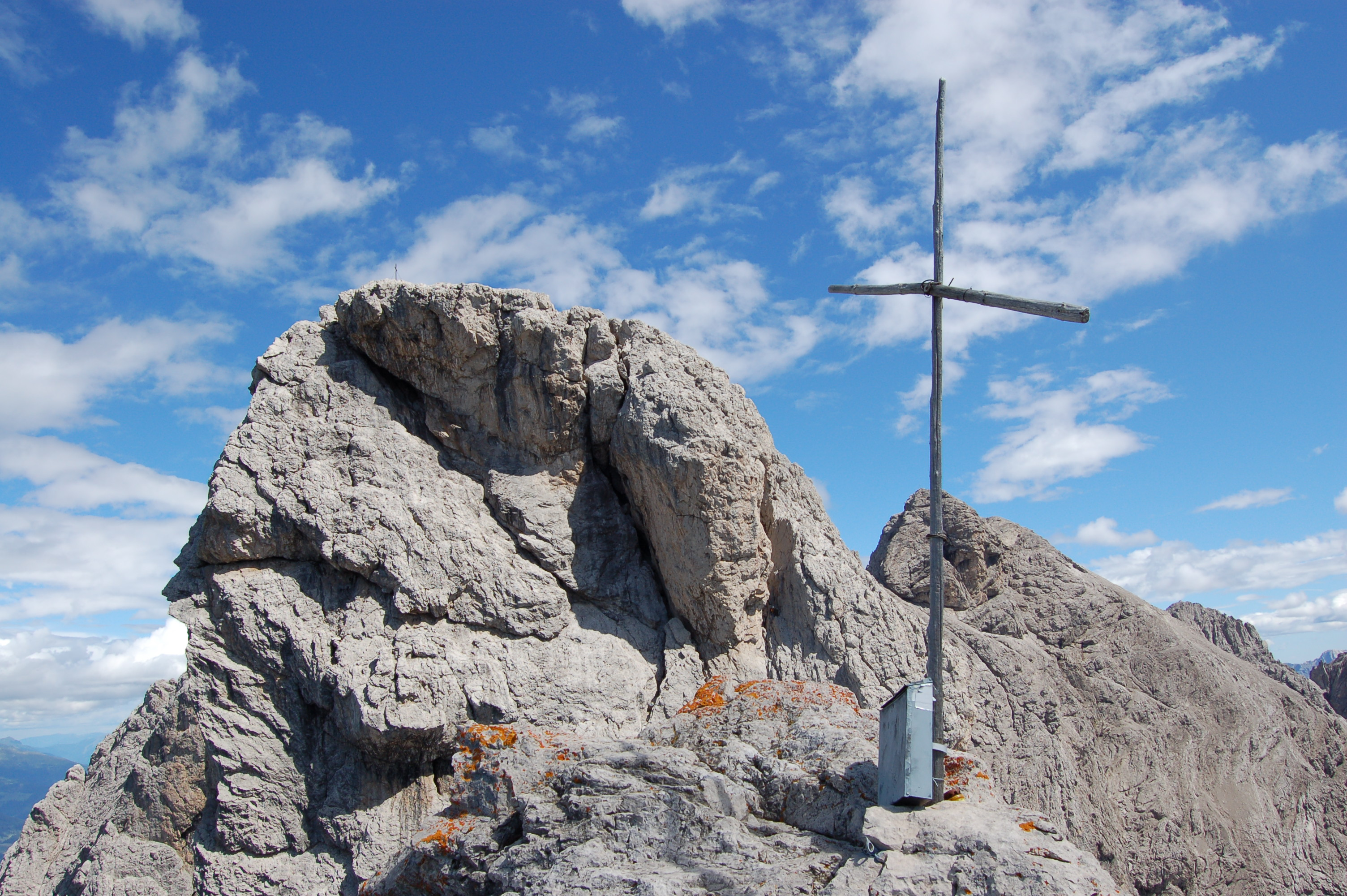 Schöttnerspitze (Laserzwand) mit Blick auf den Roten Turm